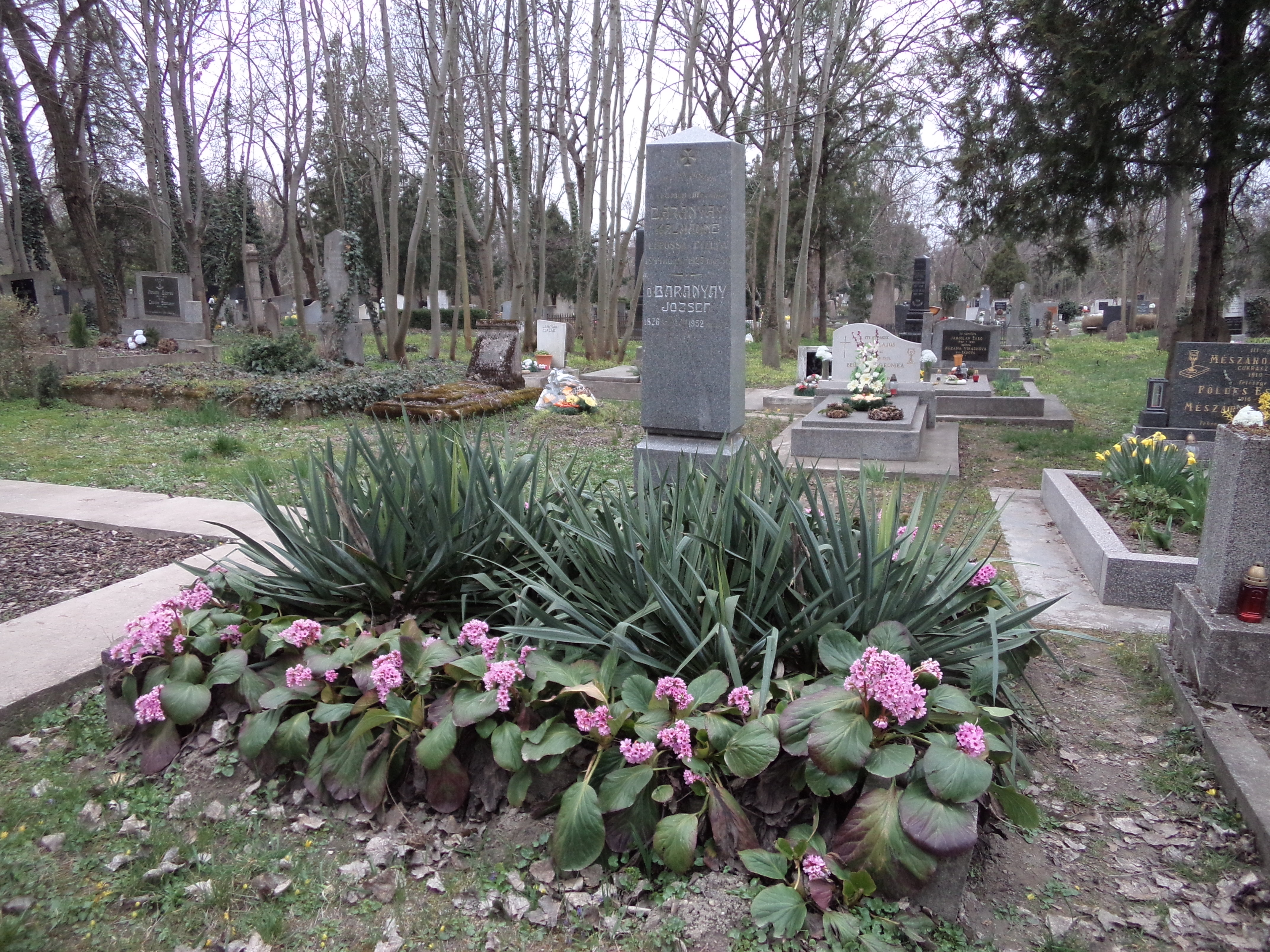 Baranyay József - Komáromi temető